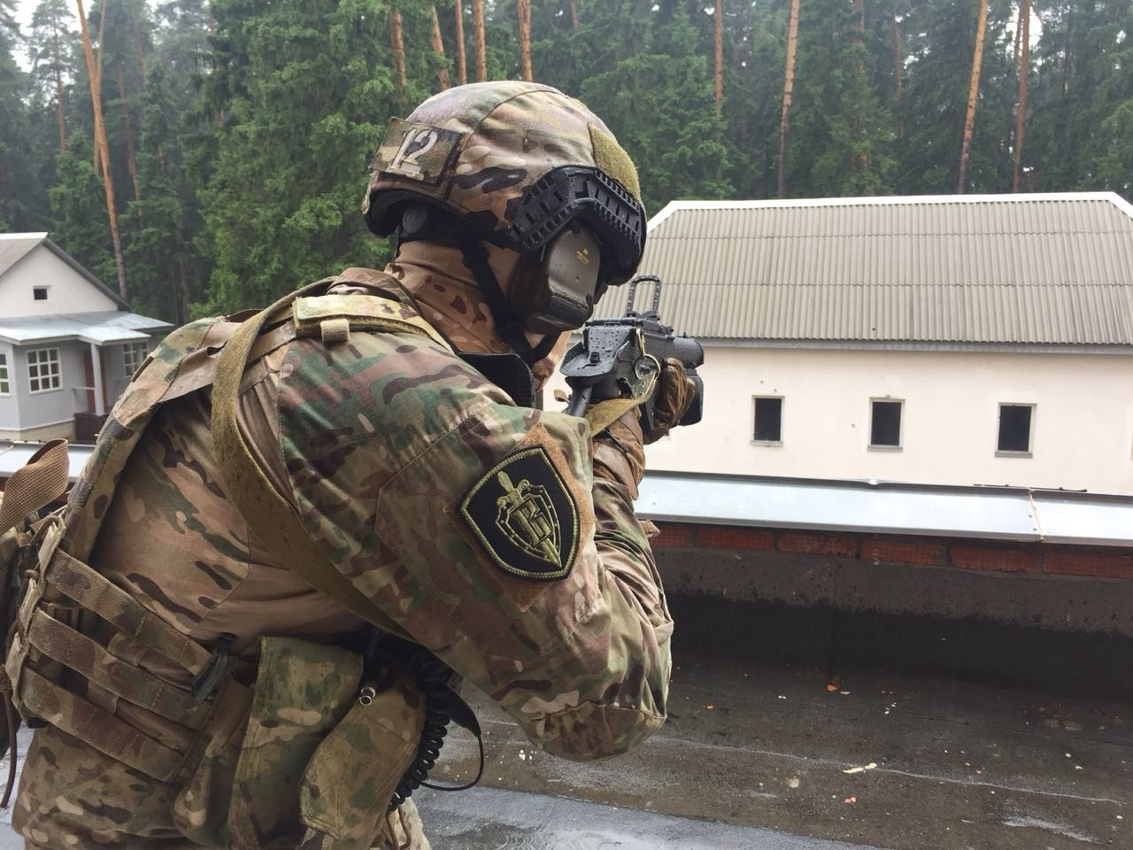 Esercitazione presso la sede centrale TsSN FSB, 2018